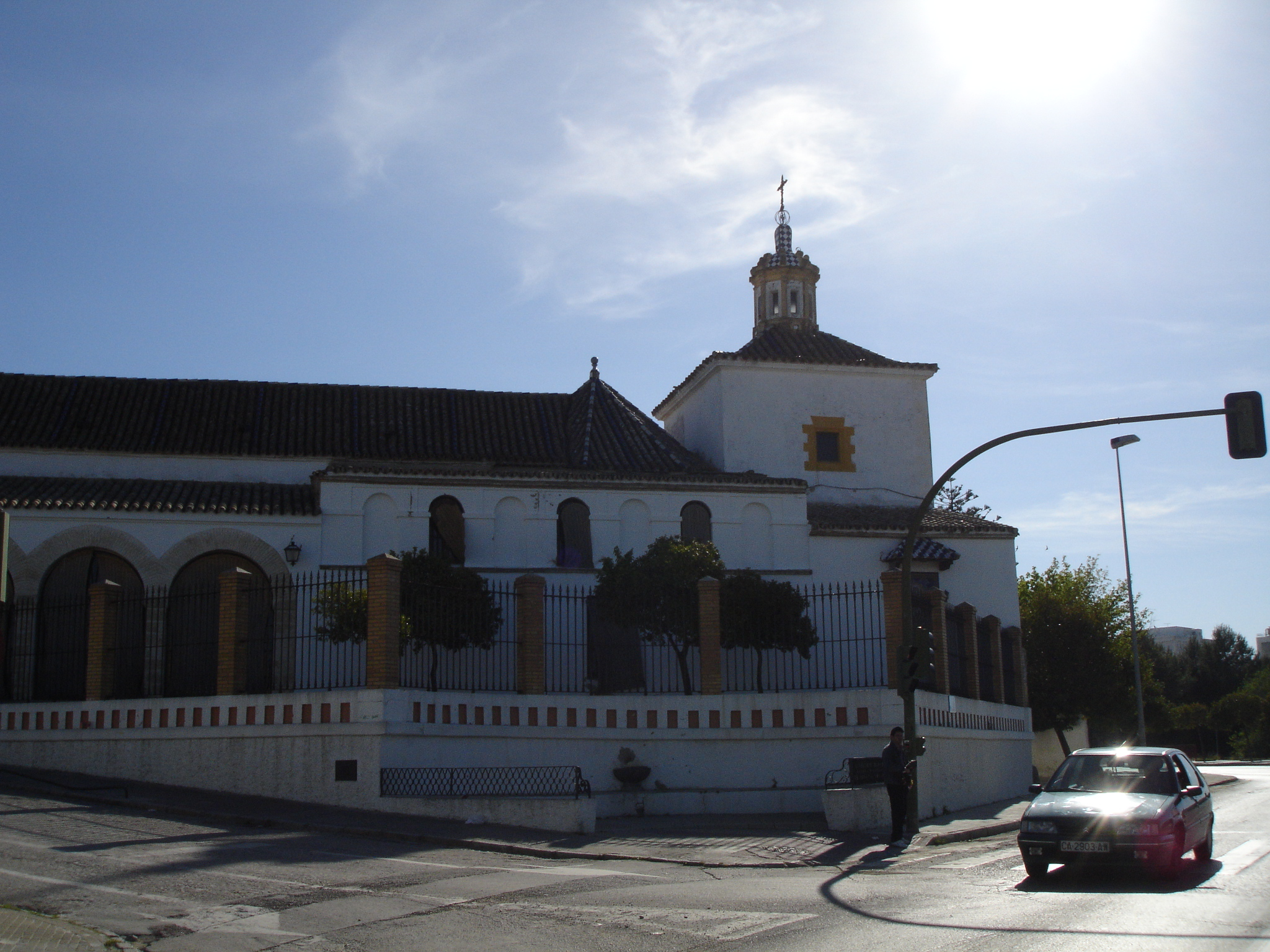 Ermita de San Telmo, Jerez (SPAIN)